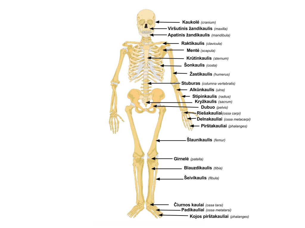 Žmogaus kaulų pavadinimai lietuvių ir lotynų kalbomis.